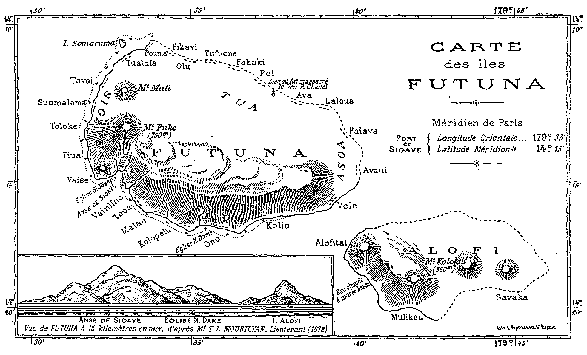 illustration de l'ouvrage "Le Martyr de Futuna" de Claude Nicolet